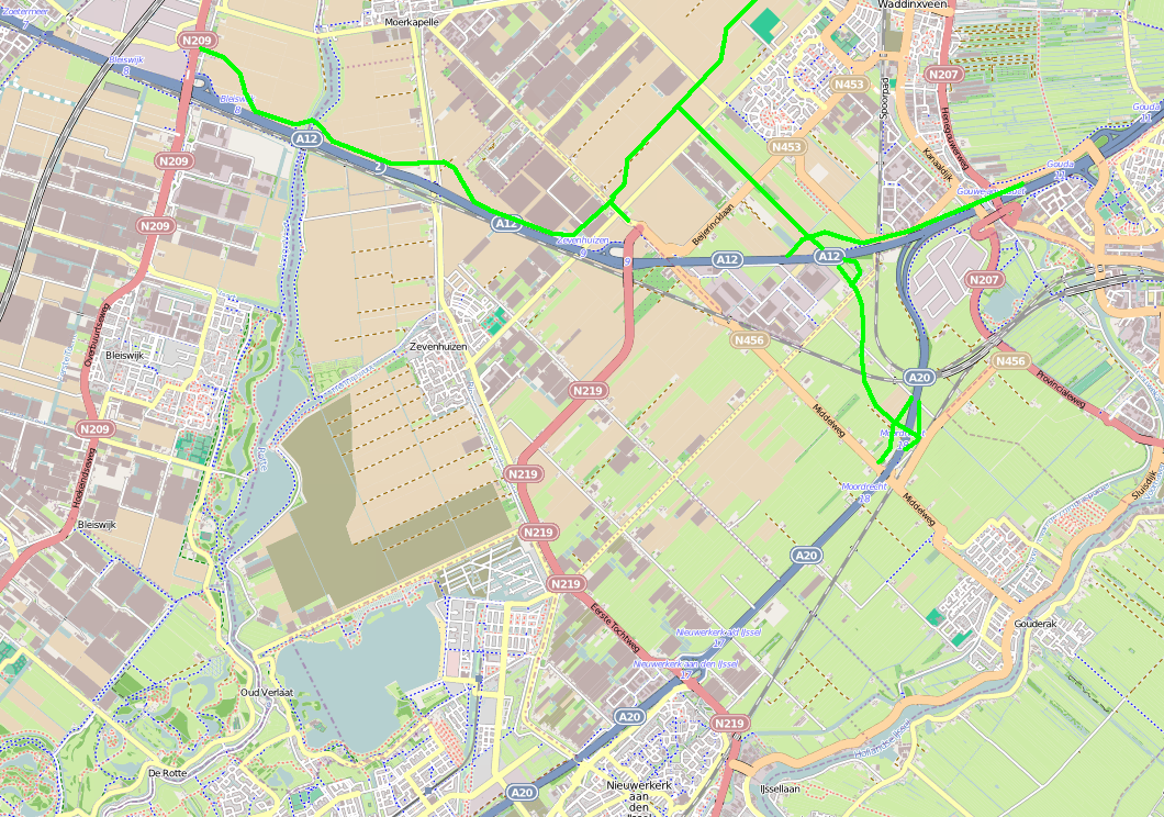 A12 , nieuwe infrastructuur in het groen